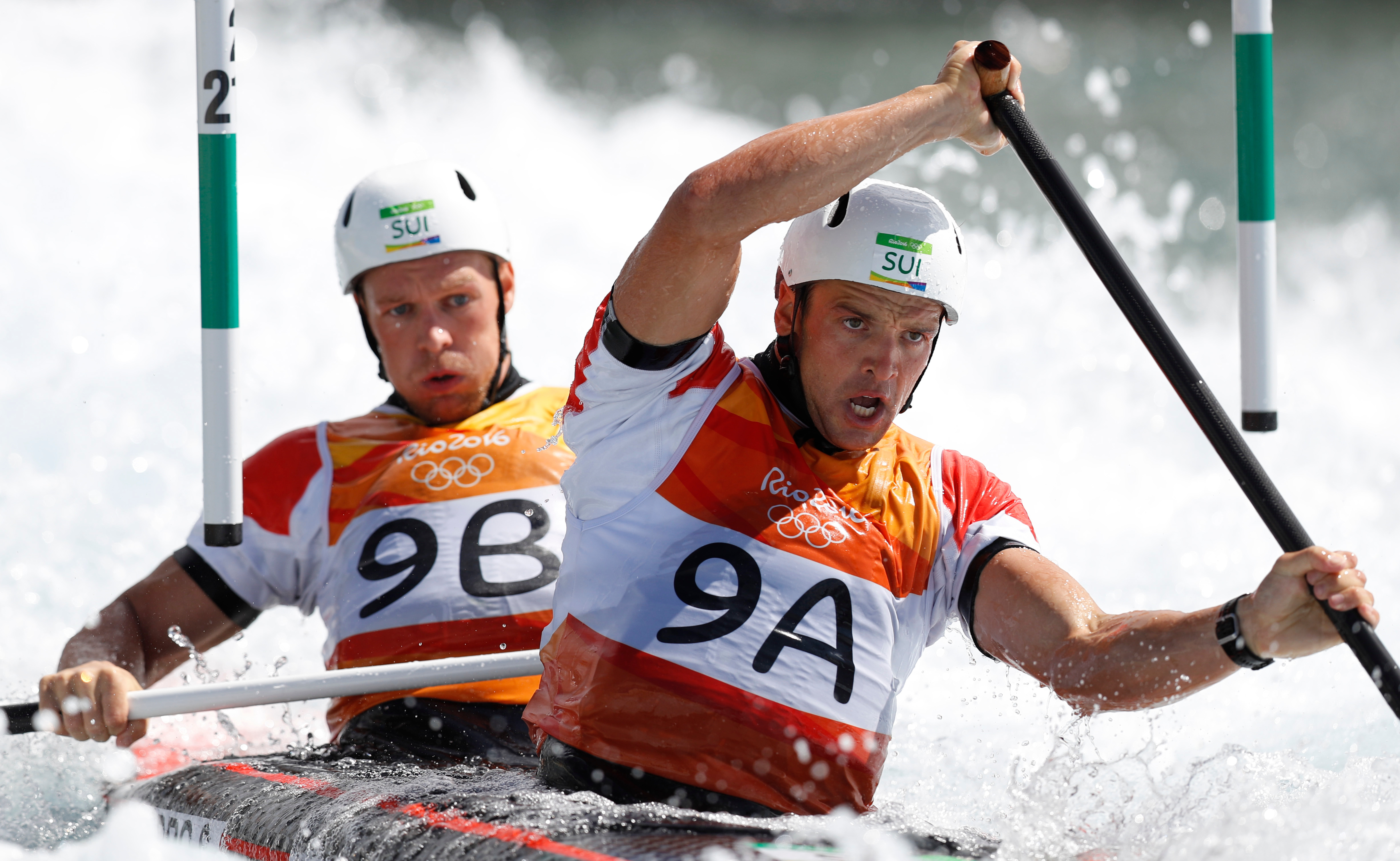 Rio de Janeiro - Irmãos suiços Lukas Werro e Simon Werro disputam canoagem slalom categoria C2 nos Jogos Olímpicos Rio 2016 no X Park em Deodoro (Fernando Frazão/Agência Brasil)